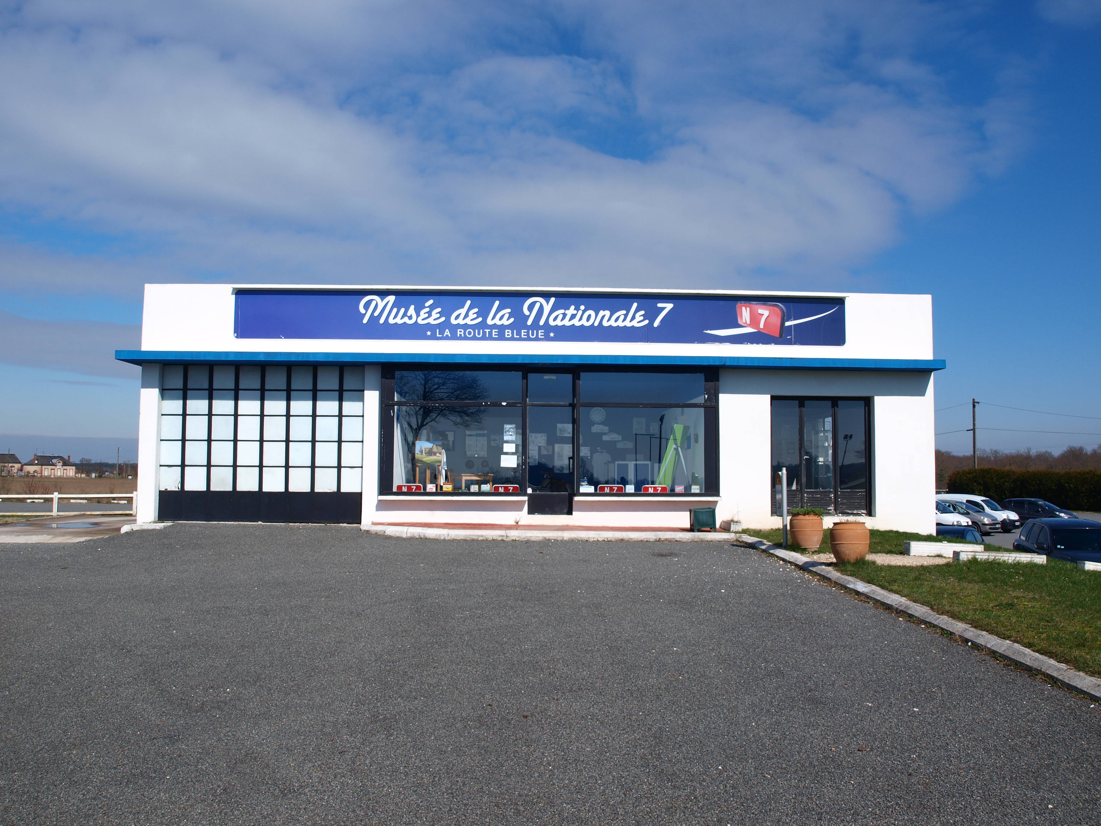 Mormant-sur-Vernisson (Loiret, France) ; musée de la RN7, près du Relais du Miel.